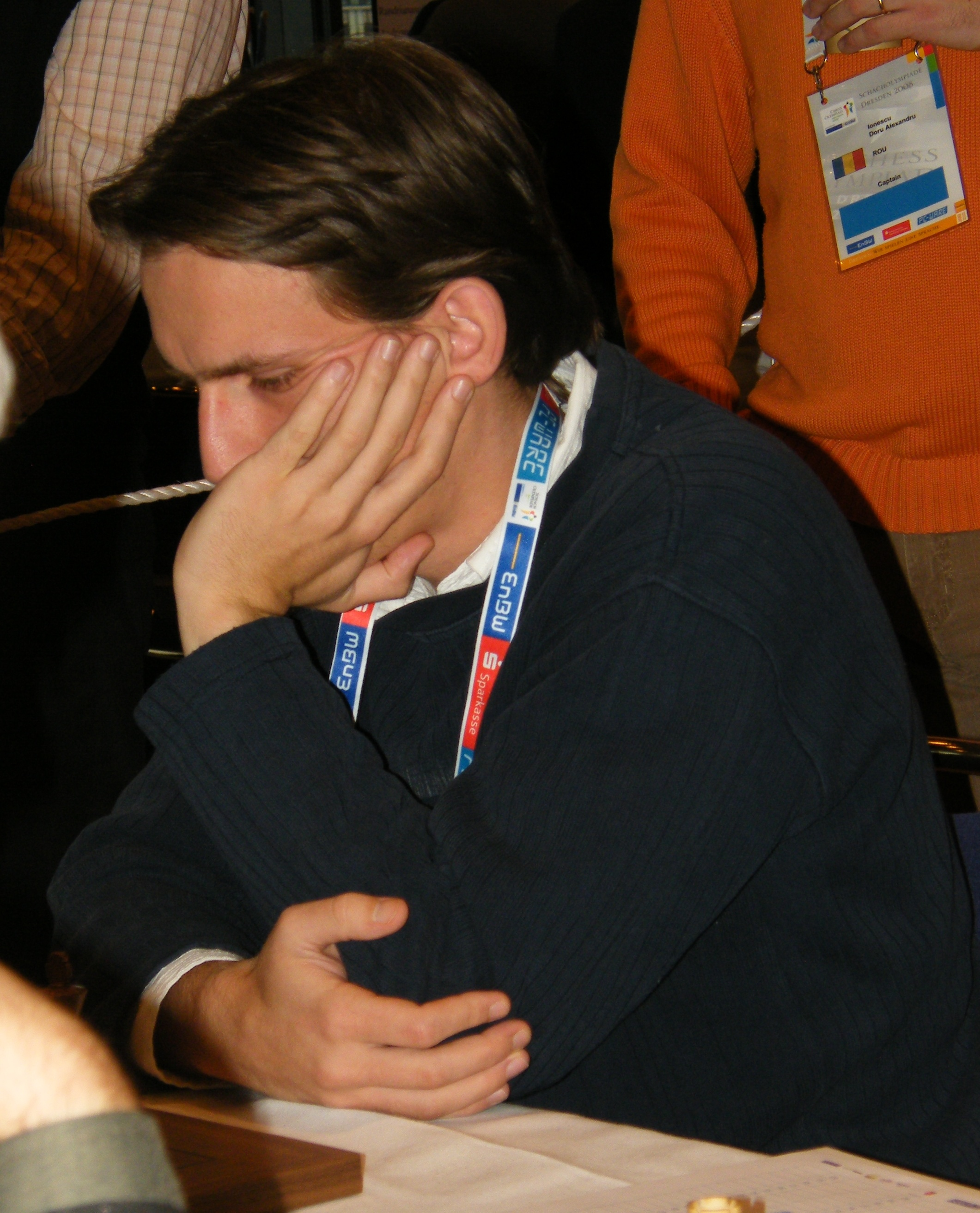 Levente Vajda bei der 38. Schacholympiade in Dresden 2008